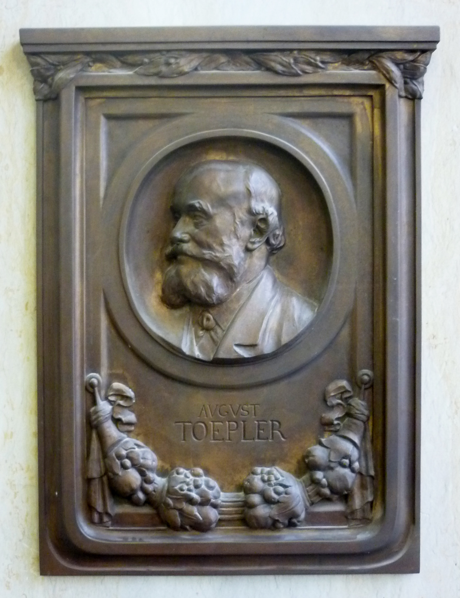 Toepler-Relief im Physik-Gebäude der TU Dresden, Eingang C